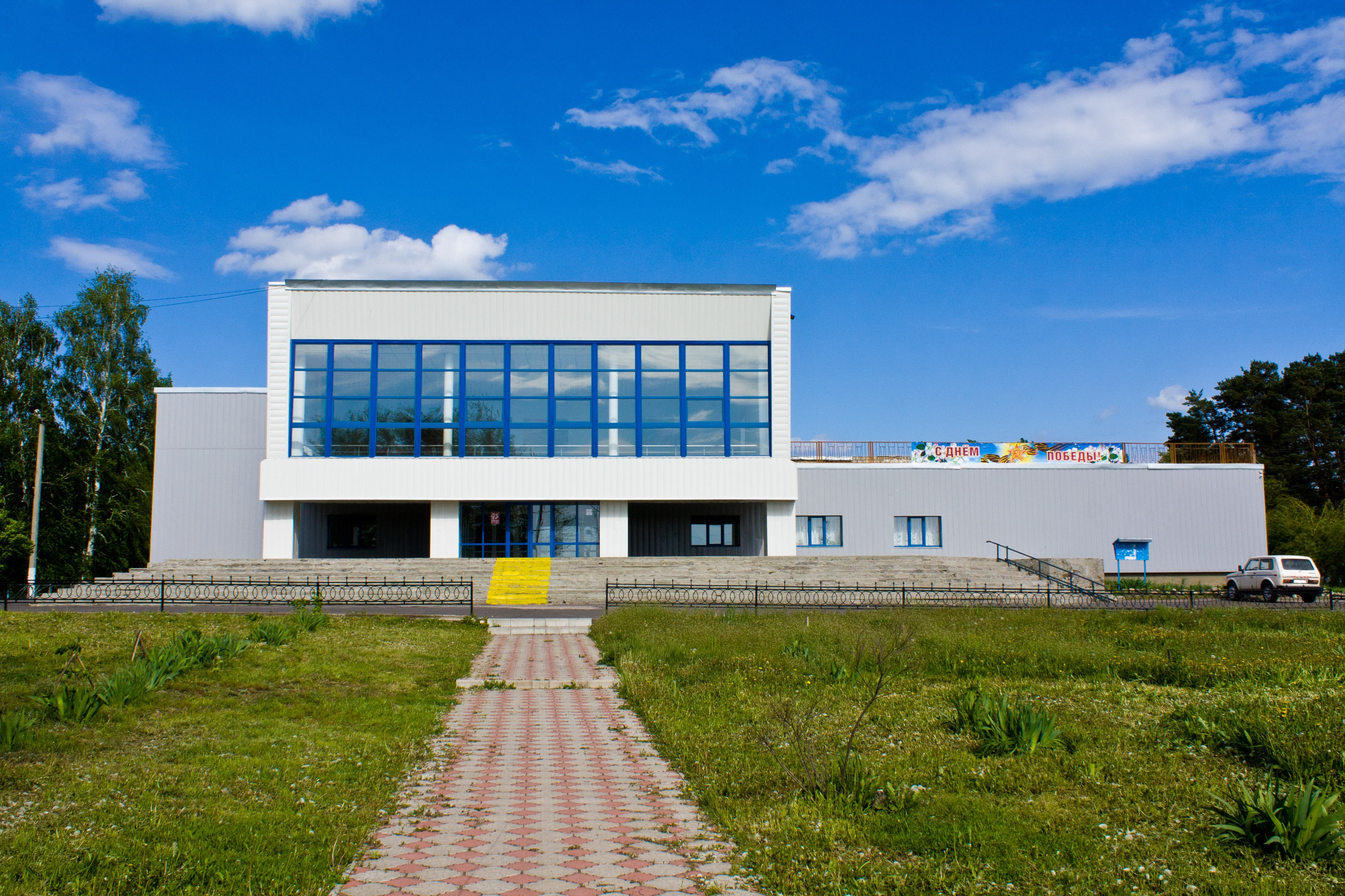 Бековский дом культуры. 2020